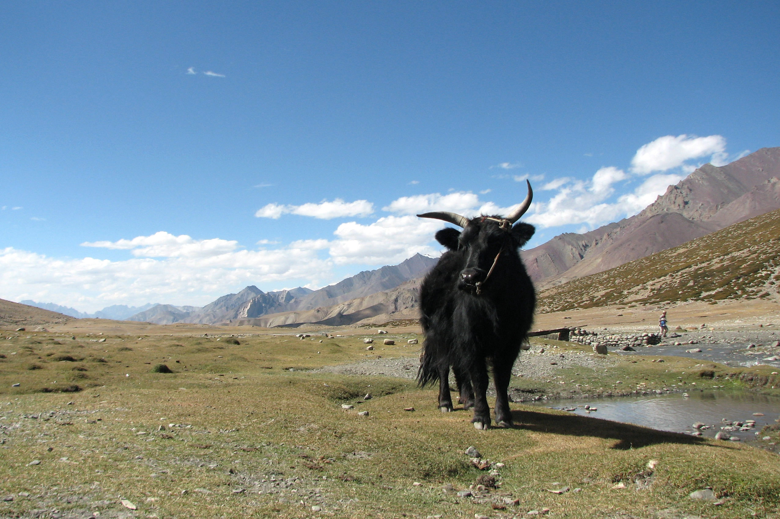 Yak seen at Markha Valley, Ladakh.